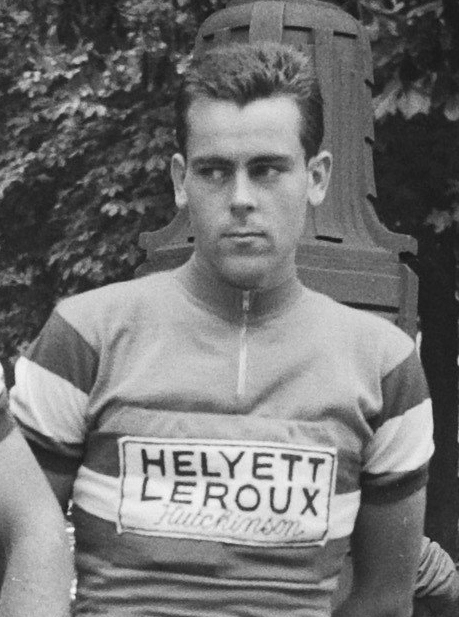 Nationaal Archief Beschrijving: De Nederlandse ploeg, Tour de France 1960 Jo de Roo Datum: 28 juni 1960 Bestanddeelnummer 911-3748 Vervaardiger: Anefo / Harry Pot (1929–1996) DescriptionDutch photographer and cinematographerDate of birth/death 1929 1996Work location Amsterdam, BentveldAuthority control : Q27877051 VIAF: 284191334 ISNI: 0000 0003 9050 874X Koninklijke: 073478326 creator QS:P170,Q27877051 URL: Voor meer informatie over het Nationaal Archief: Voor meer foto's uit deze en andere collecties, bezoek onze Beeldbank:, U kunt ons helpen onze kennis van de fotocollecties te verrijken door tags en commentaren toe te voegen. Herkent u mensen of locaties of heeft u een bijzonder verhaal te vertellen bij één van de foto's, laat dan een reactie achter (als u ingelogd bent bij Flickr) of stuur een mailtje naar